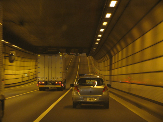 2009年8月11日、空港北トンネル内で撮影